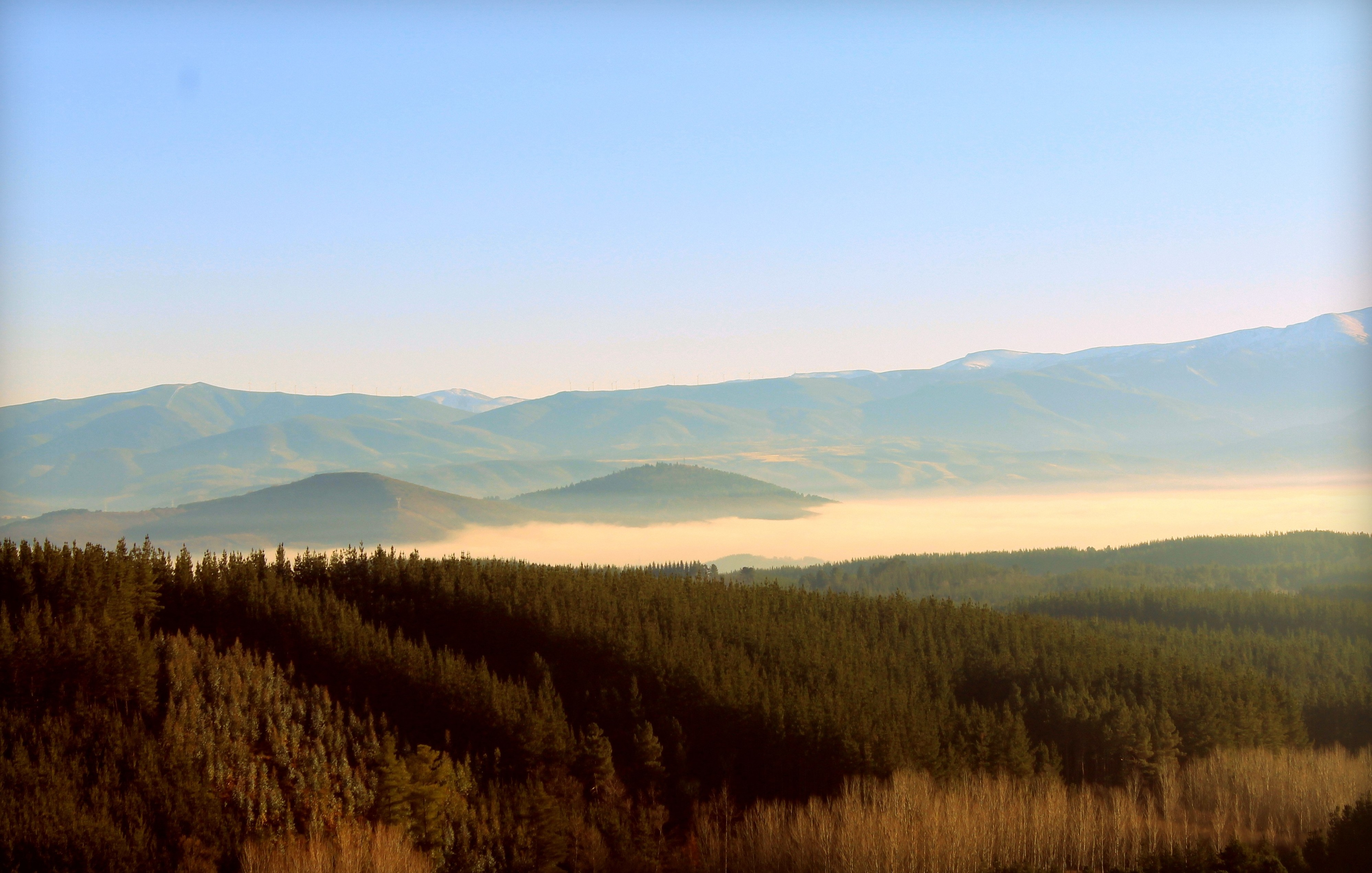 vista desde Sancedo (León)